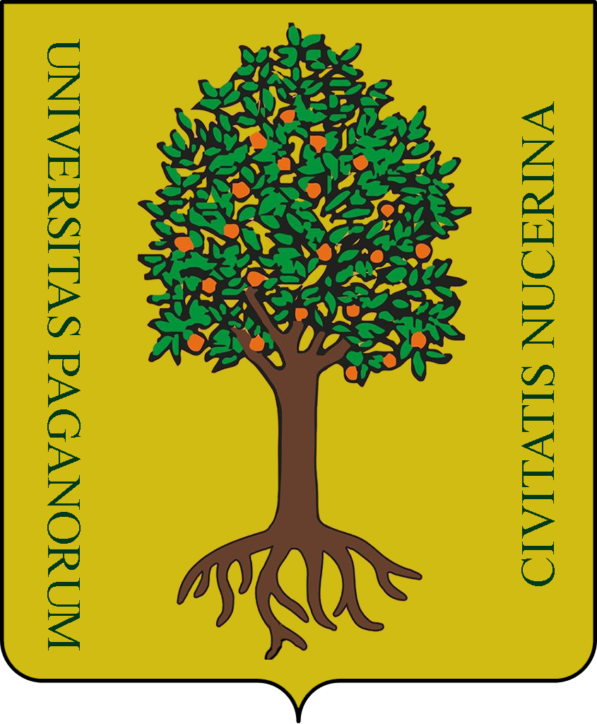 Riadattazione dello stemma dell'antica università di Pagani, realizzato seguendo le ricerche storiche usate anche dalle associazioni rievocative del territorio. La riproduzione è approssimata ed ha un puro fine informativo e didattico.